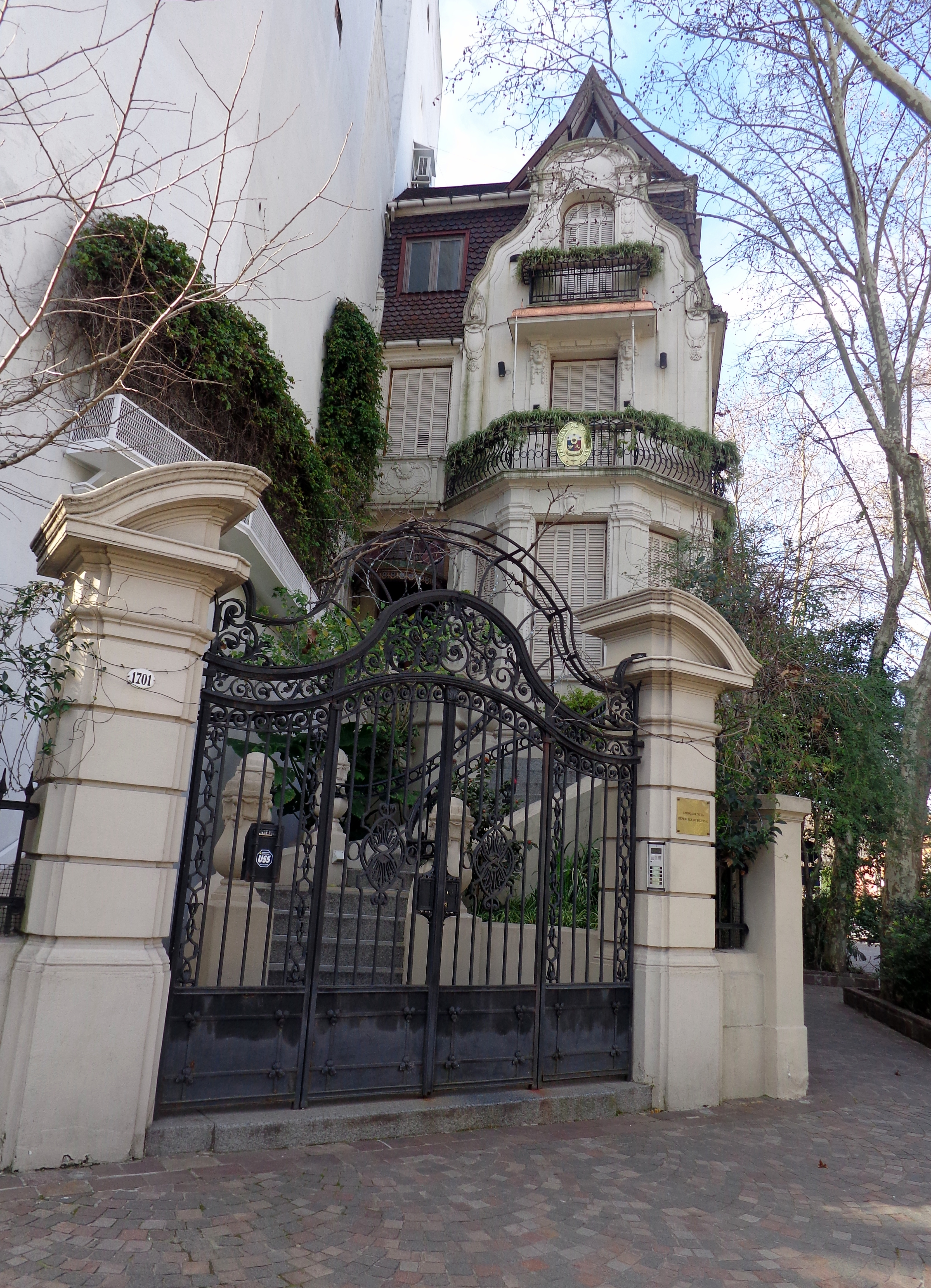 Embajada de Filipinas en Buenos Aires, del Arquitecto Lorenzo Siegerist. Zapiola 1701 esquina Virrey del Pino, ex Petit Hotel, ex- Hotel Victory